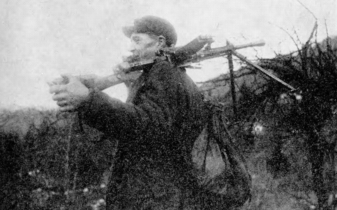 15. brigada na pohodu iz Semiča proti Črmošnjicam po podelitvi prvih odlikovanj 17. novembra 1944